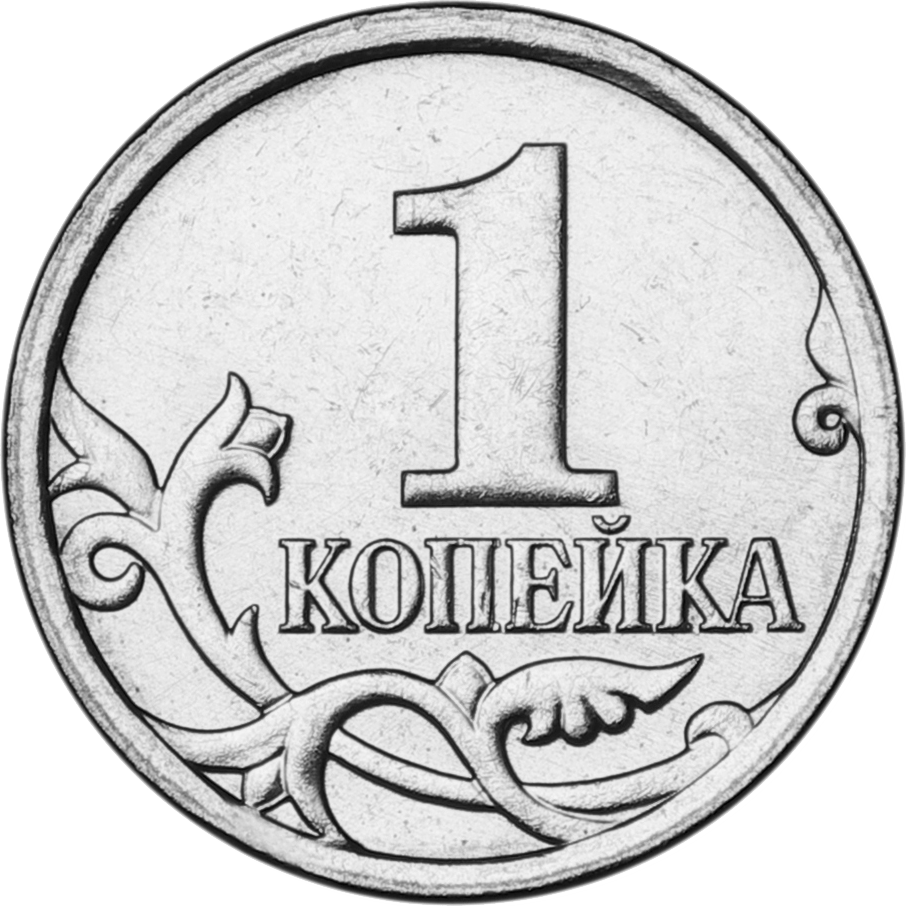 1 копейка образца 1997 , производное от File:1 копейка 2007.jpg